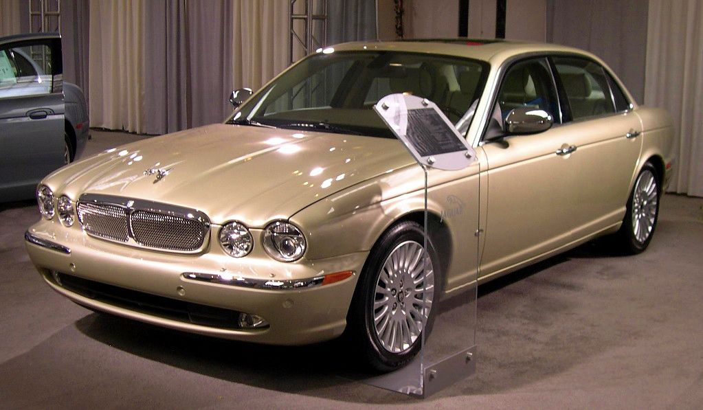 MY 2006 Jaguar XJ (X350)